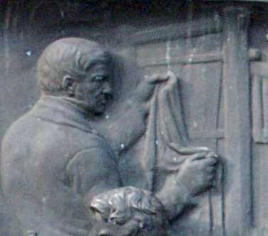 Detail Friedrich Freiherr von Diergardt bei der Sammetprüfung; Relief an der Südseite des Reiterstandbild auf dem Kölner Heumarkt. Persönlichkeiten aus Handel, Gewerbe und Industrie.